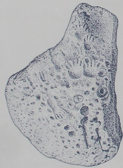 Ausschnitt der Schautafel vor Ort: Zeichnung des Schalensteins von 1911. Quelle: Mitteilungen des Anthropologischen Vereins 1911, Heft 19, 20-25 Auch in Archäologisches Landesamt Schleswig-Holstein; C.Rothmann, Die Grabkammer mit dem Schalenstein bei Bunsoh in Dithmarschen.